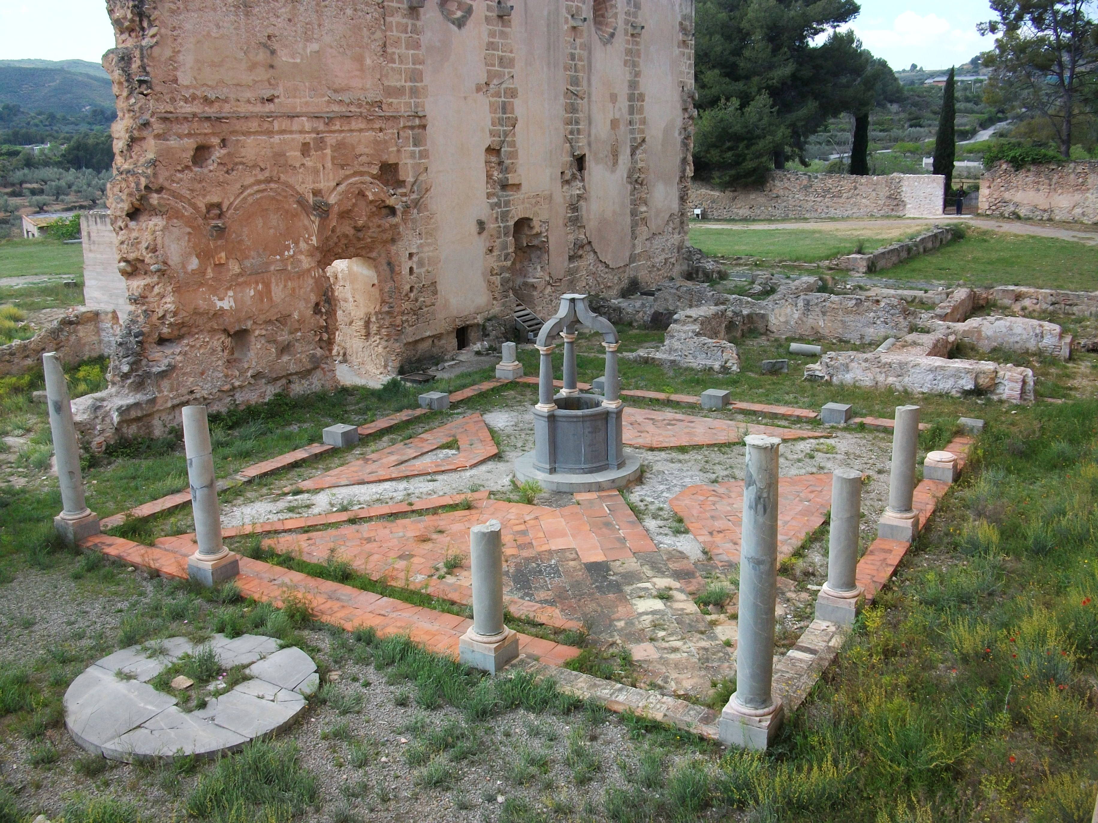 Claustre menor o de Sant Jeroni de la Cartoixa de Valldecrist, Altura, Alt Palància.